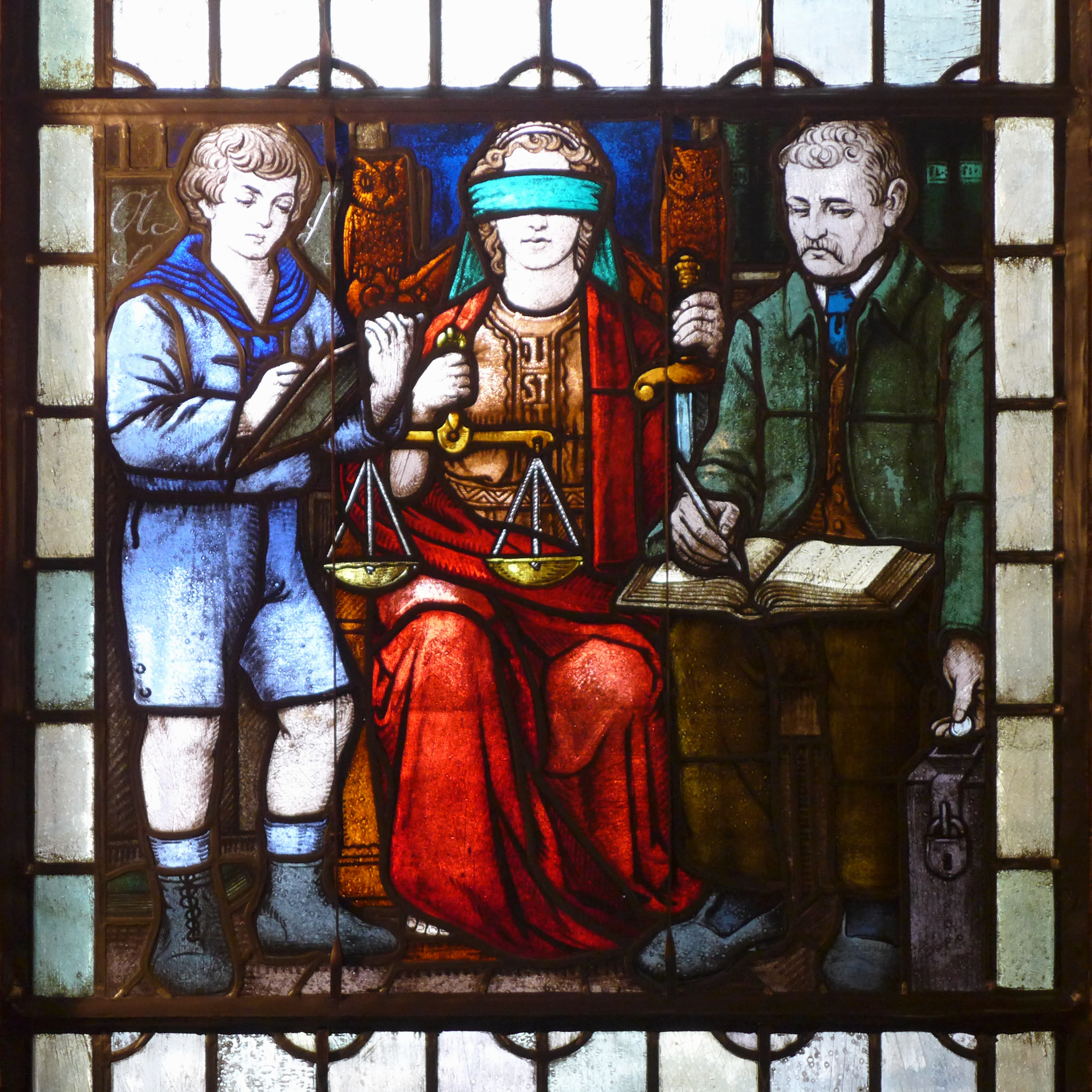 Rathaus Buxtehude, Glasmalerei im Treppenaufgang zum Obergeschoss. Gebäude erbaut in 1914 nach Plänen des Architekten Alfred Sasse (Hannover) als Ersatz für das durch Brand zerstörte mittelalterliche Rathaus und unter Verwendung von Ausstattungselementen aus dem 16. Jahrhundert des Vorgängerbaues. Im Bild zu sehen: Die Gegenwart von Justitia bei der Steuereinname für die Stadtkasse.